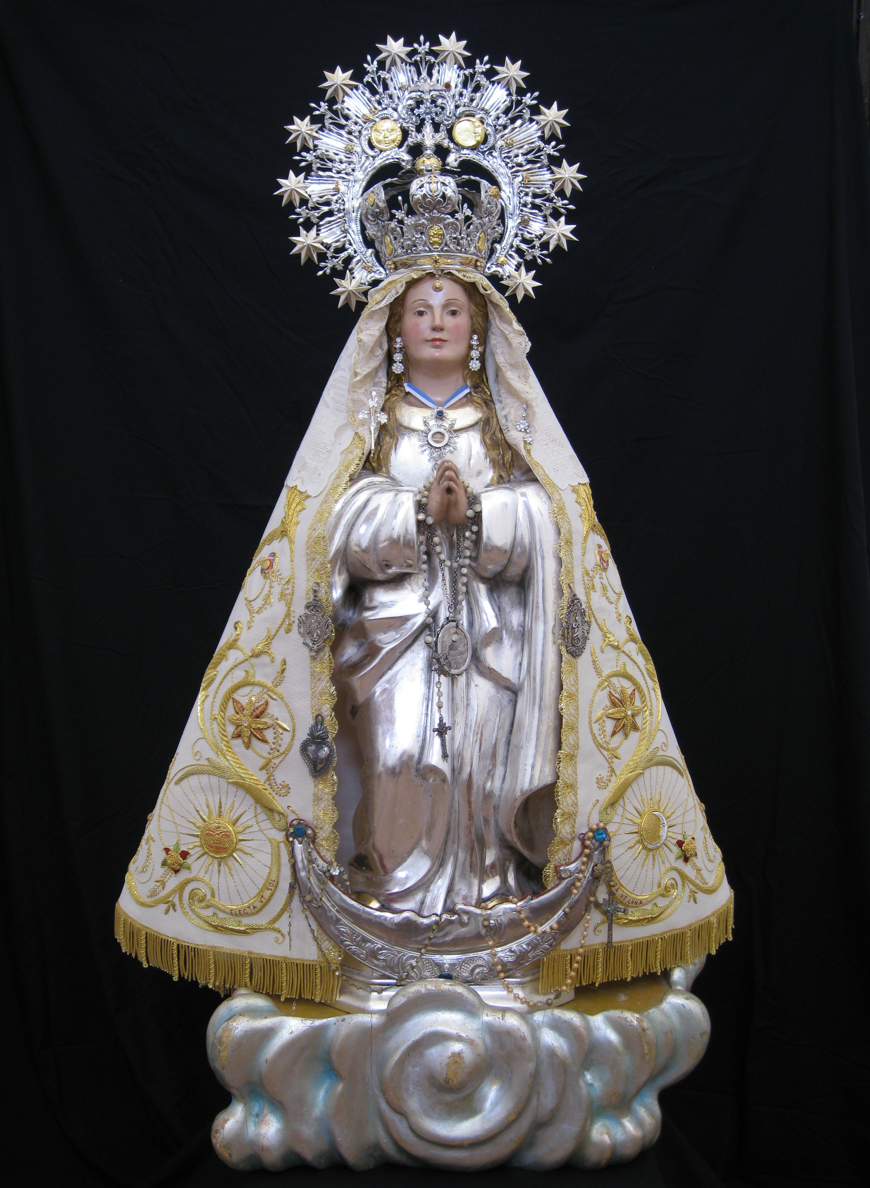 Amada imagen de la Purísima Concepción que es cuidada por su hermandad en Puebla del Salvador